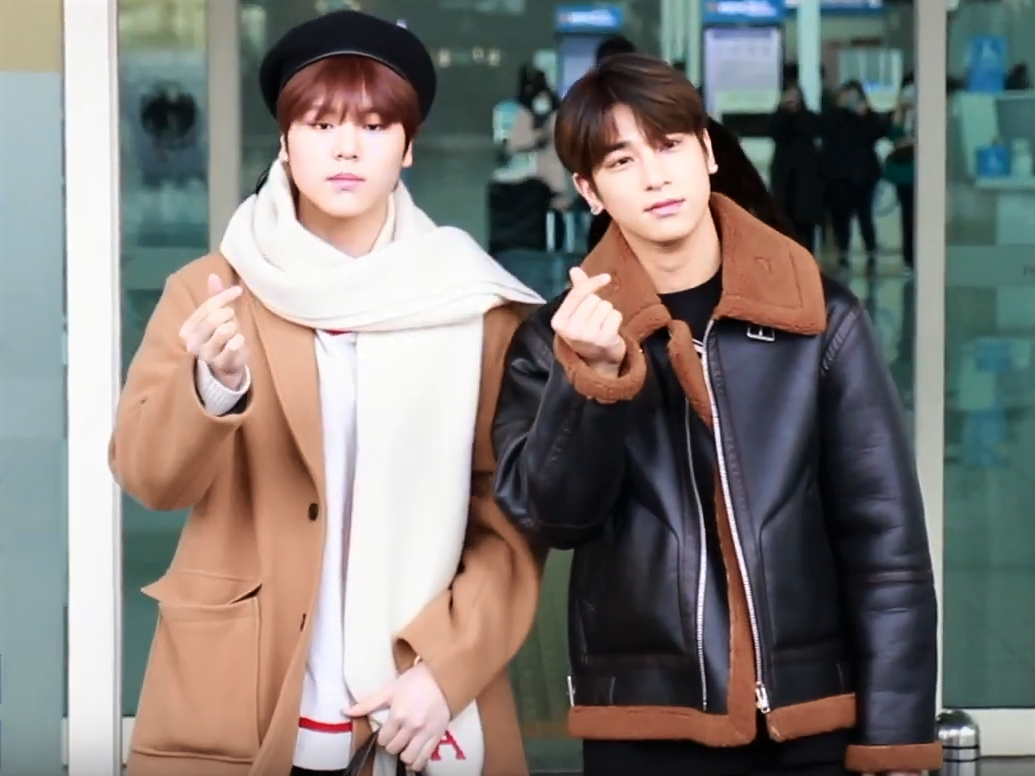 2월 7일 오전 인천시 중구 운서동 인천국제공항에서 이한결, 남도현이 일본 삿뽀로에서 열리는 '12th K-POPFESTIVAL 2020' 참석을 위해 일본으로 출국하고 있다.